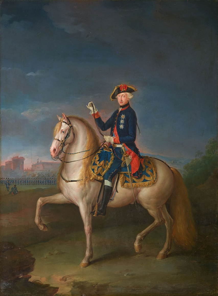 Caption from the museum's website El soberano napolitano, que en este retrato aparenta tener unos veinte años, viste uniforme de color azul oscuro, pantalón sujeto por cinturón blanco y abotonado en la pierna, casaca con vueltas rojas, y calza botas de montar de caña alta. Su peluca, blanca y corta, deja libre una larga coleta sobre su espalda. Se cubre con tricornio decorado con escarapela roja y sus manos se protegen con guantes blancos. Además de la banda carmesí de la orden napolitana de San Gennaro que cruza el pecho encima de su camisa blanca, en la casaca o guerrera luce tres placas o condecoraciones: la de la misma orden, de la que era gran maestre; la francesa del Saint-Esprit, recibido como caballero el 8 de septiembre de 1760; y la orden española de Carlos III creada por su padre en 1771. Montado en un caballo bayo, ensillado sobre gualdrapa azul de flecos decorada por anchas bandas bordadas en oro, su pose bélica se refuerza mediante una pistola de arzón cuya funda hace juego con la manta del animal y una espada de rica empuñadura colgada del cinturón y enfundada en un tahalí de cuero en el que se halla sujeta la cruz de San Gennaro.